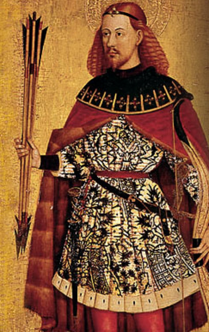 Taula de Sant Sebastià de la Col·legiata de Xàtiva (segle XV), atribuïda a Jacomart, per a la qual es pensava que havia servit de model Ausiàs March.